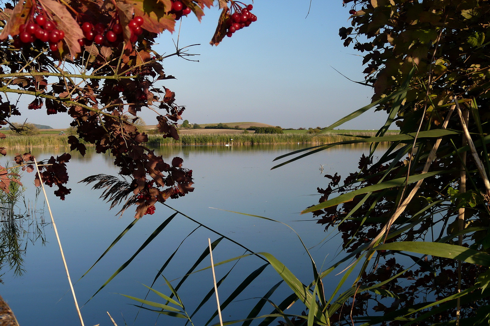 Rybník Turecká